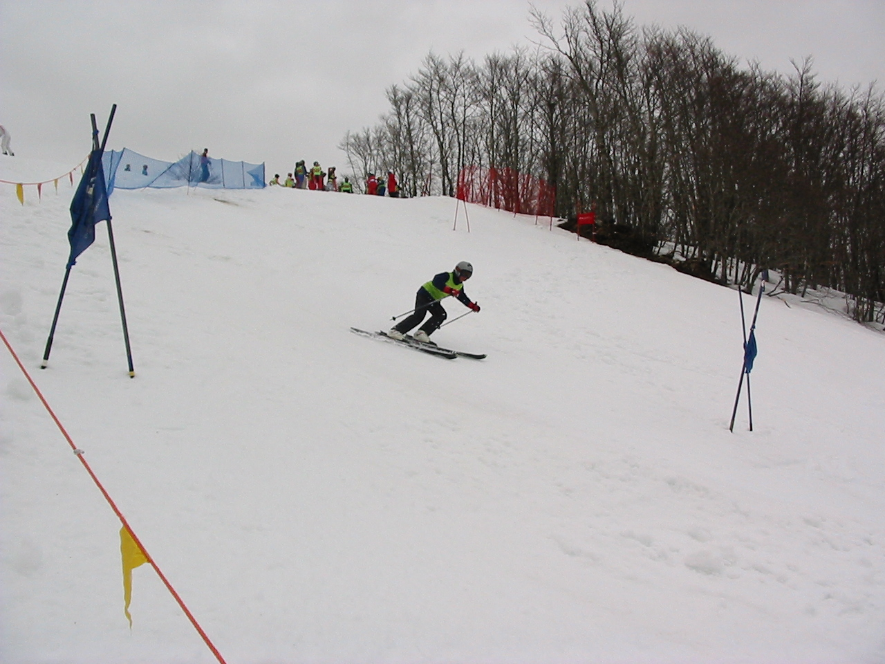 Gara di slalom gigante organizzata dallo "Sci club Rocca di Cambio"